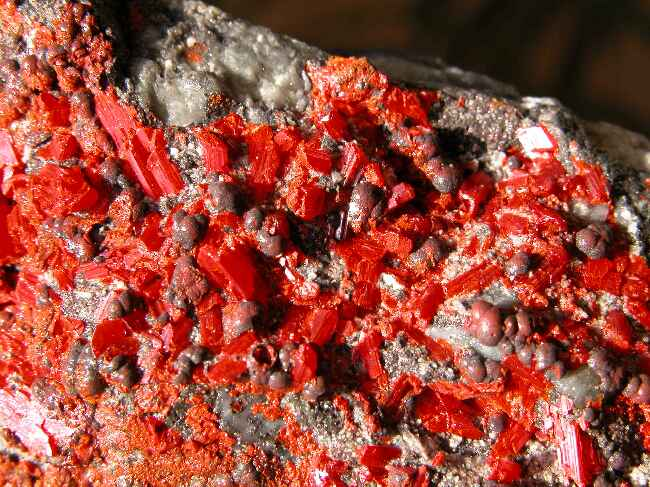 realgar, pochodzenie Rumunia, Baia Sprie autor zdjęcia Piotr Menducki